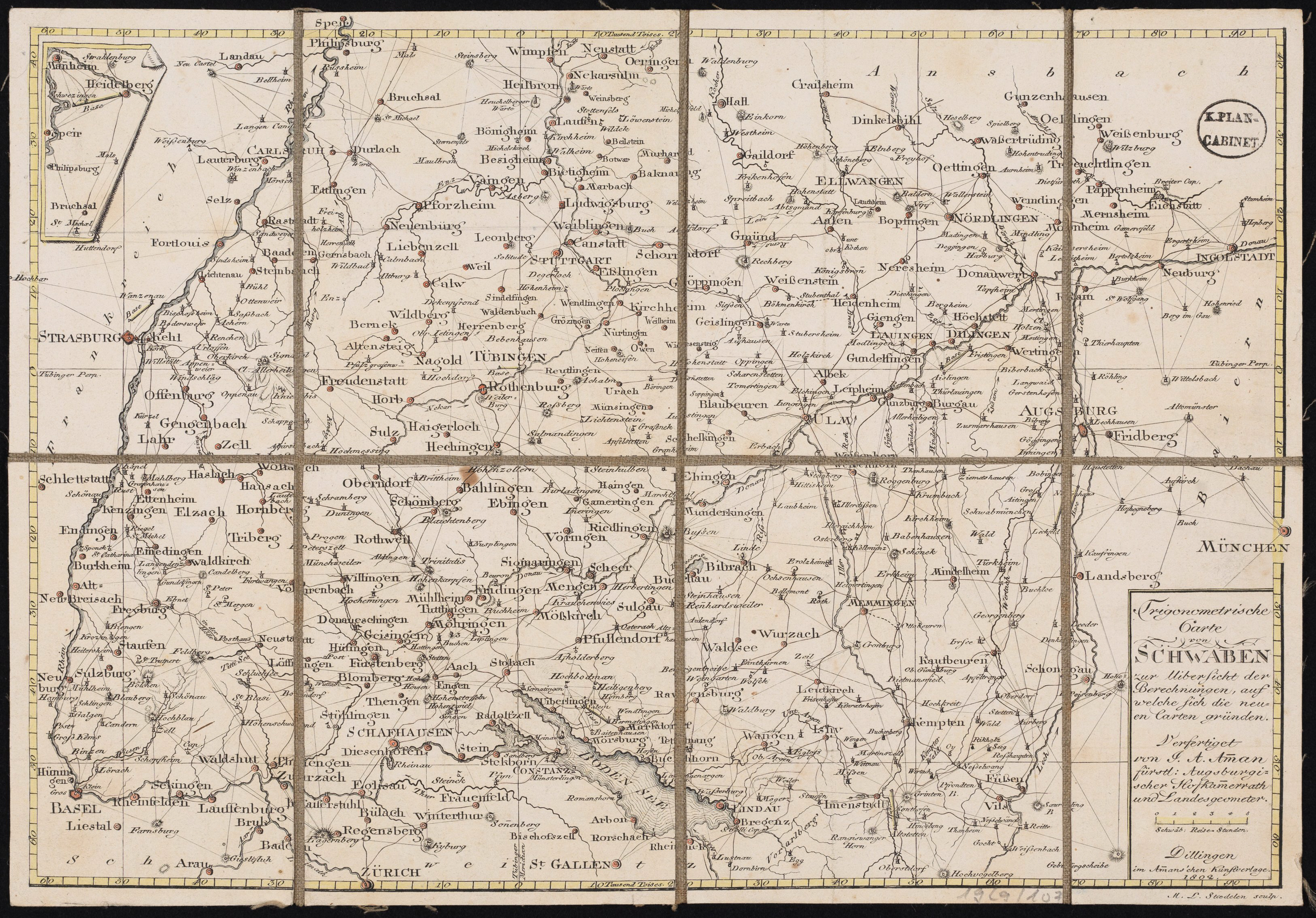 Trigonometrische Carte von Schwaben, zur Übersicht der Berechnungen, auf welche sich die neuen Carten gründen, Ammanscher Kunstverlag, Dillingen 1802, Maßstab ca. 1:830000